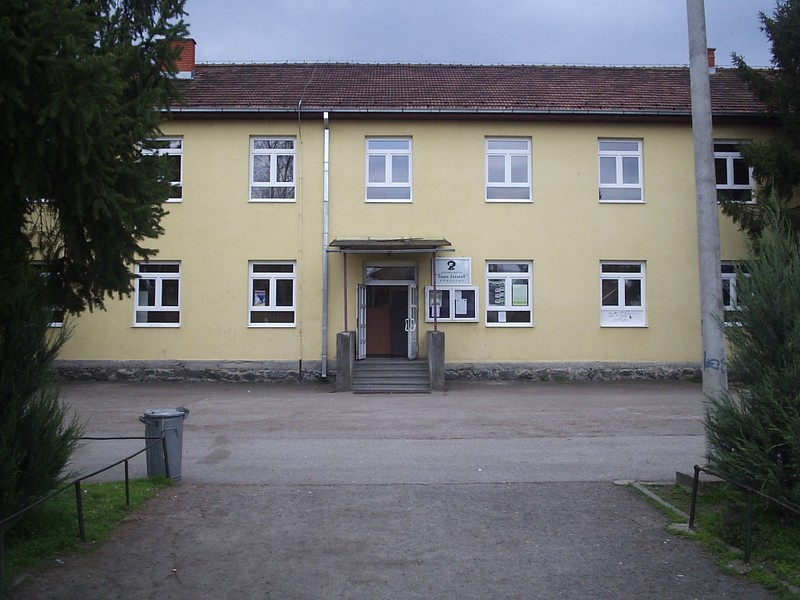 Основна школа „Ђура Јакшић“ у Конареву.--Методичар зговор2а 22:09, 20. април 2011. (CEST) Licensing